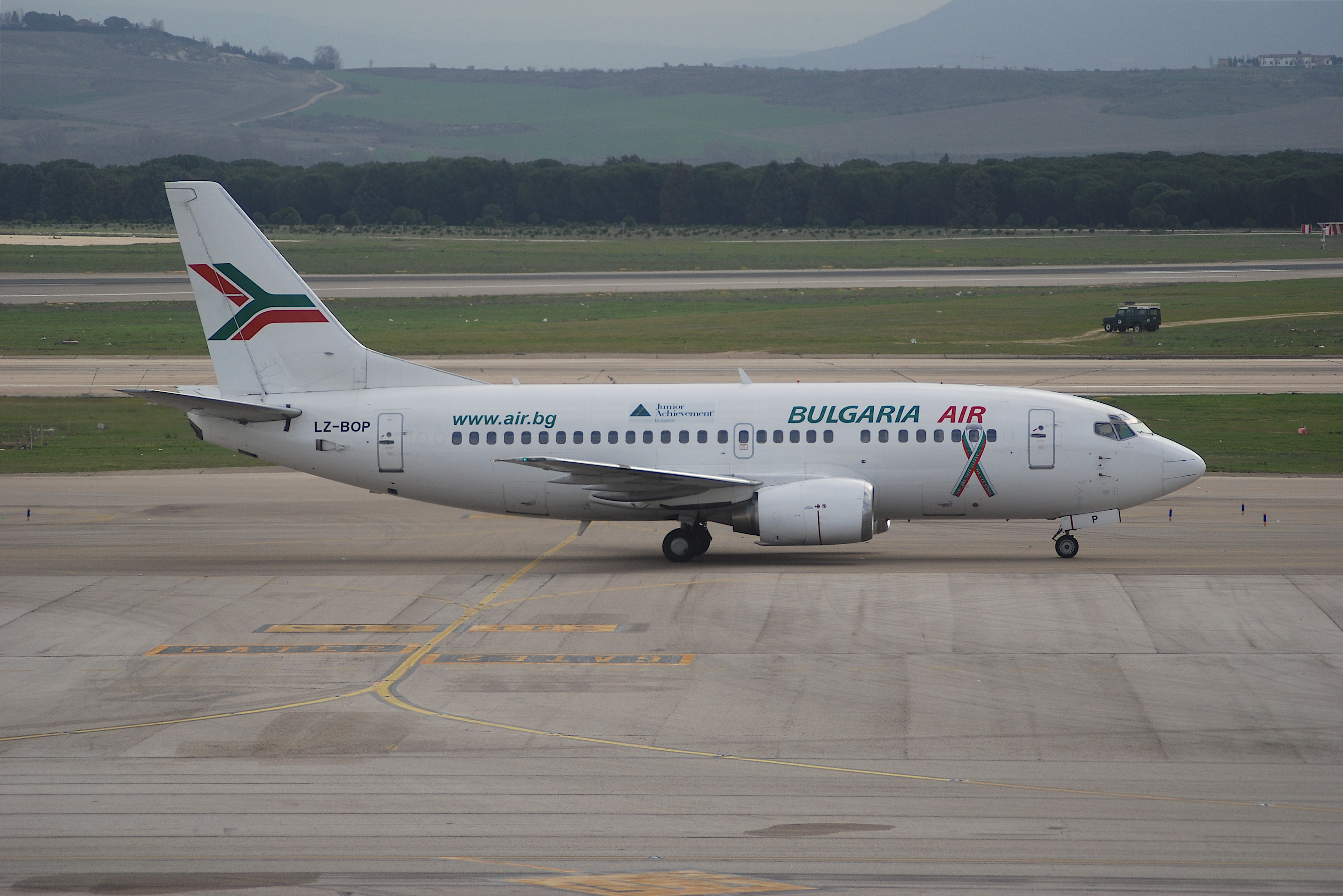 Bulgaria Air Boeing 737-500; LZ-BOP@MAD;25.02.2007/452bg